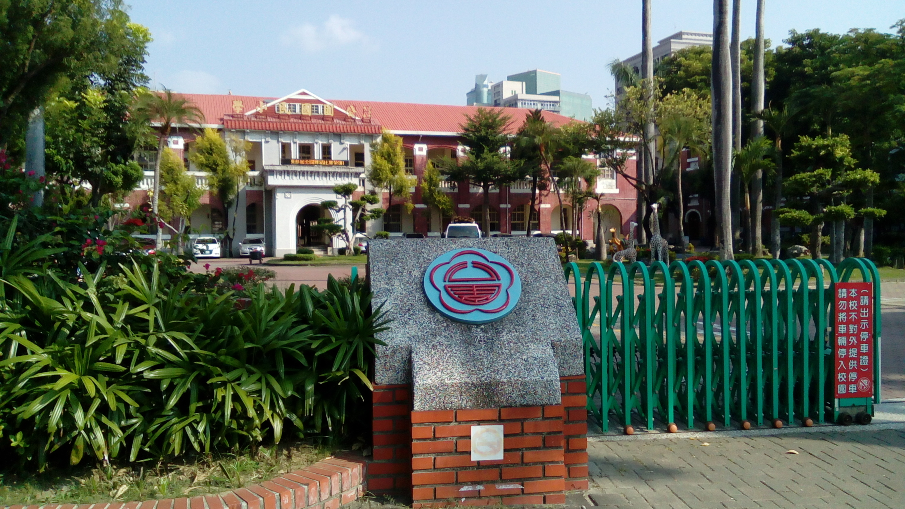 台南公園南郊 公園路上